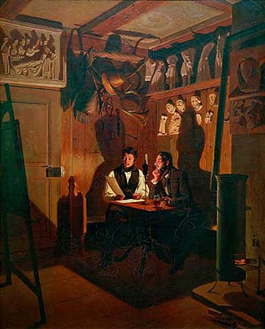 Selbstbildnis mit Malerfreund Heinrich von Arx